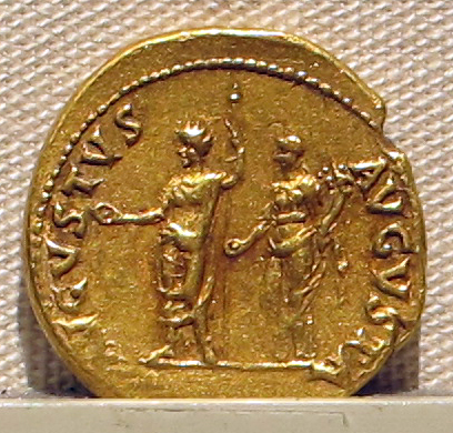 Palazzo Massimo alle Terme